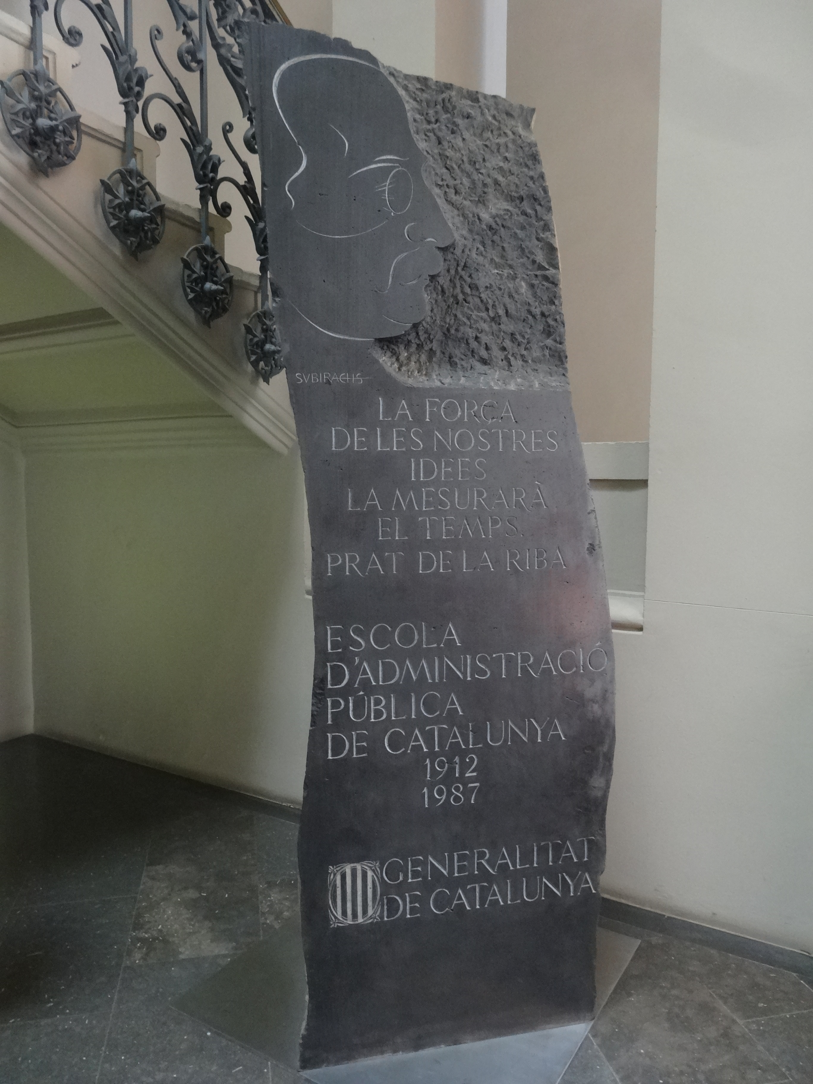 Monòlit d’homenatge a Enric Prat de la Riba, obra de Josep Maria Subirachs, situada al vestíbul de l'Escola d'Administració Pública de Catalunya